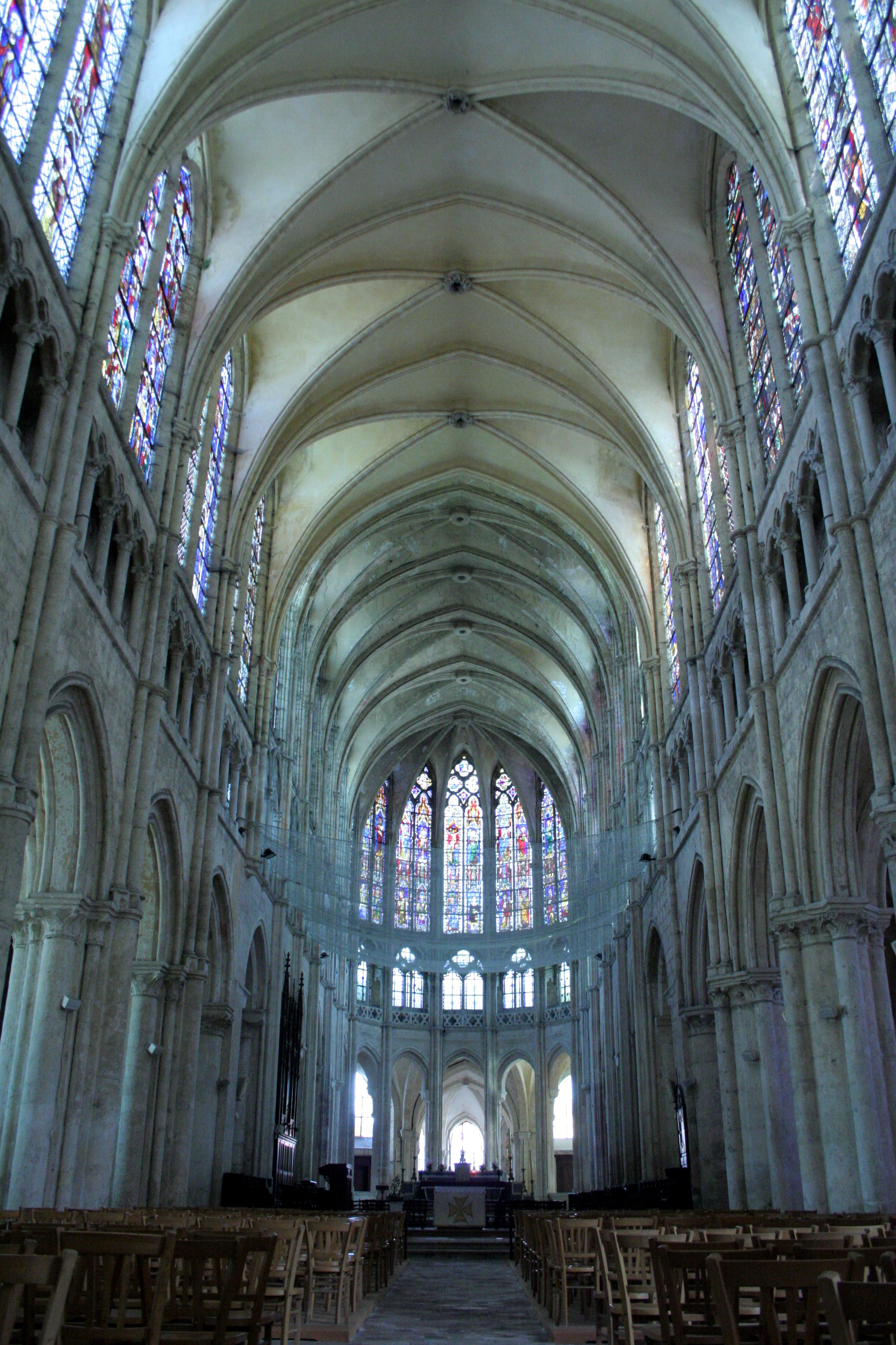 Intérieur de l'église Saint-Pierre de Chartres, France.